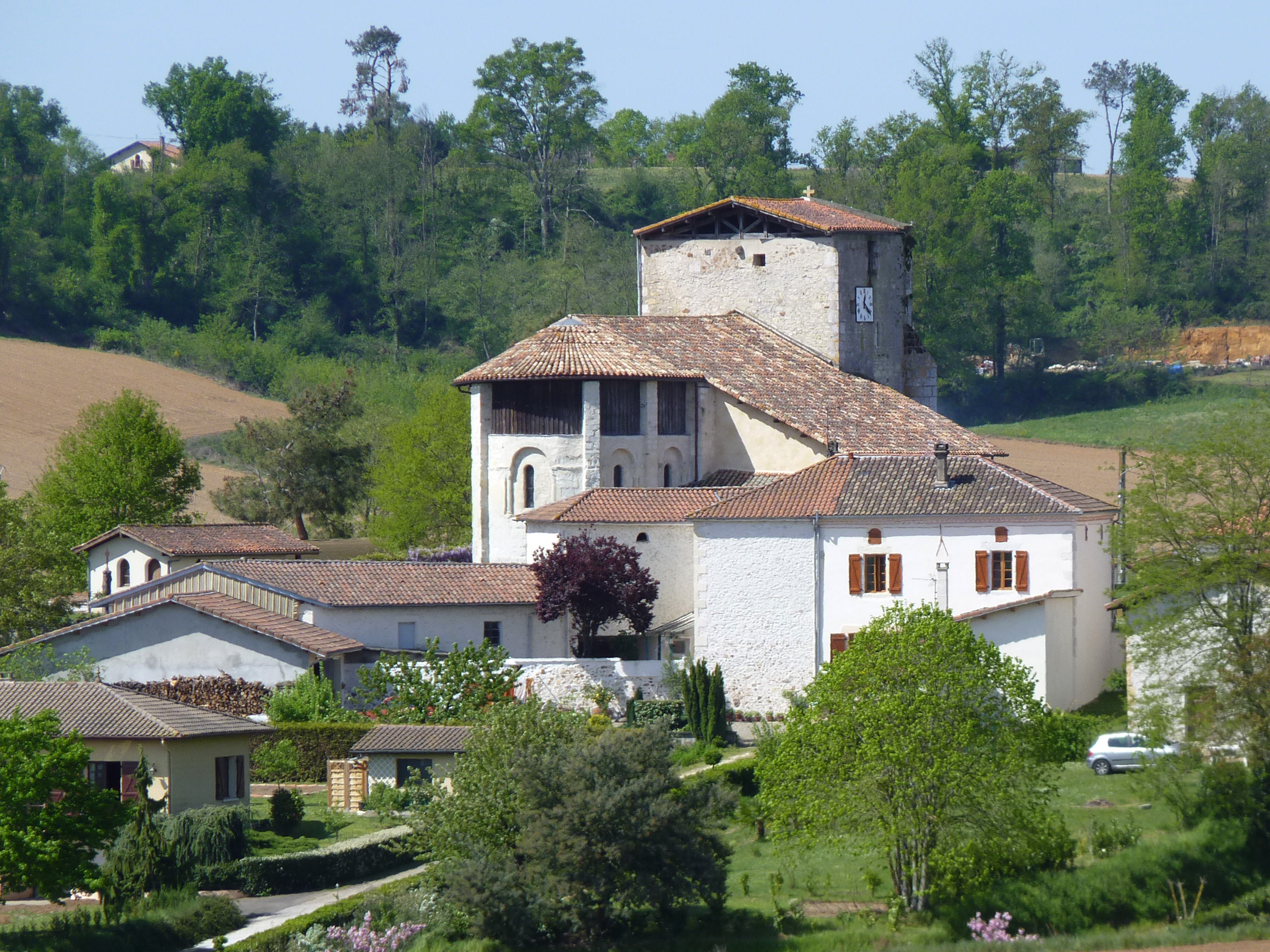 Saint-Aubin en Chalosse (Landes)